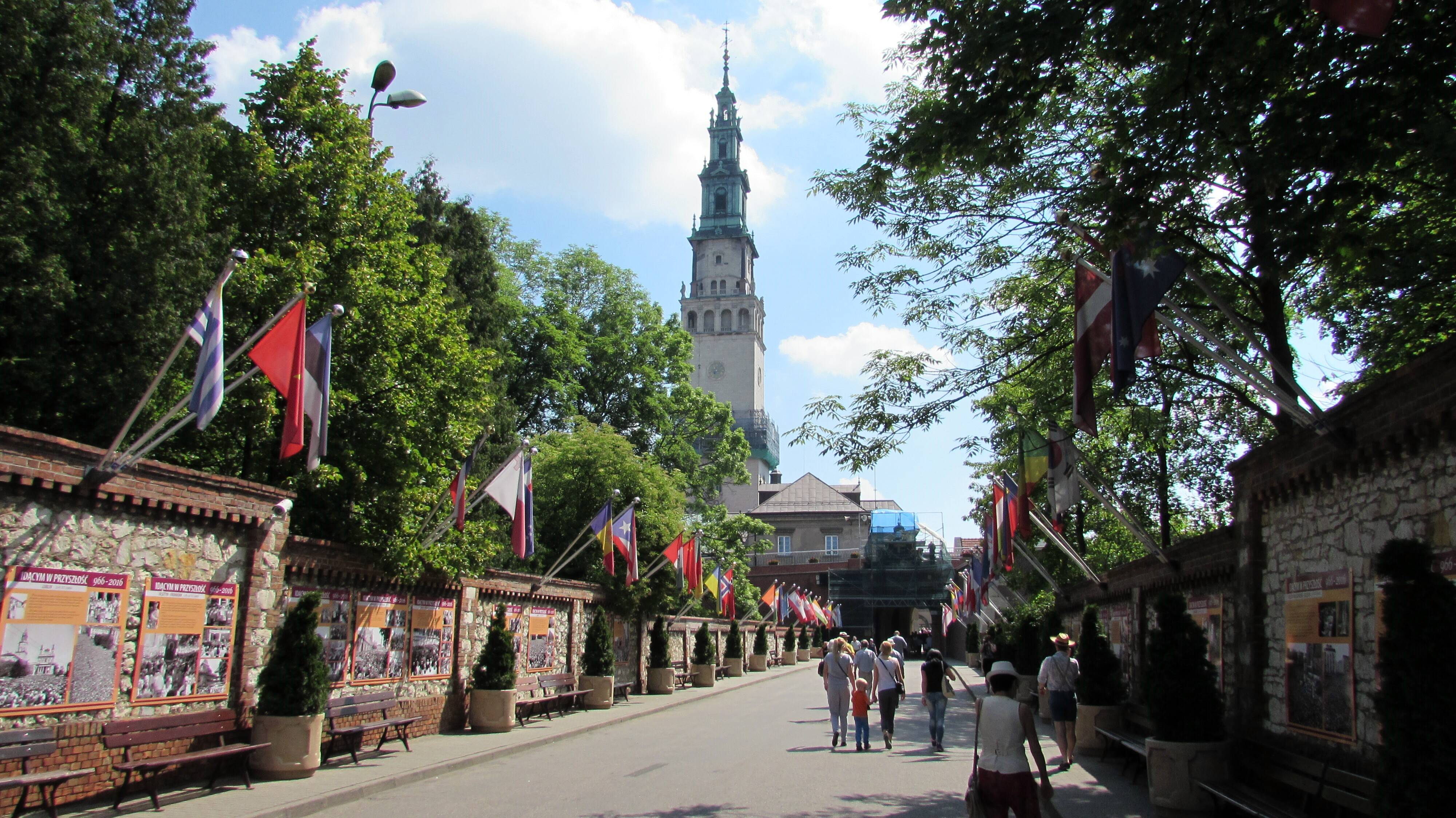 Jasna Gora Eingang